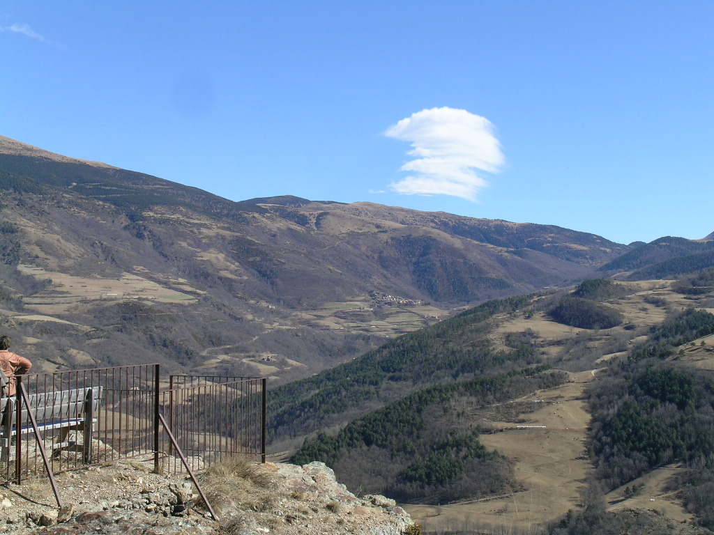 El Puig de Mont-Roig (1991,4 m), el 1er.cim a l'esquerra del núvol.